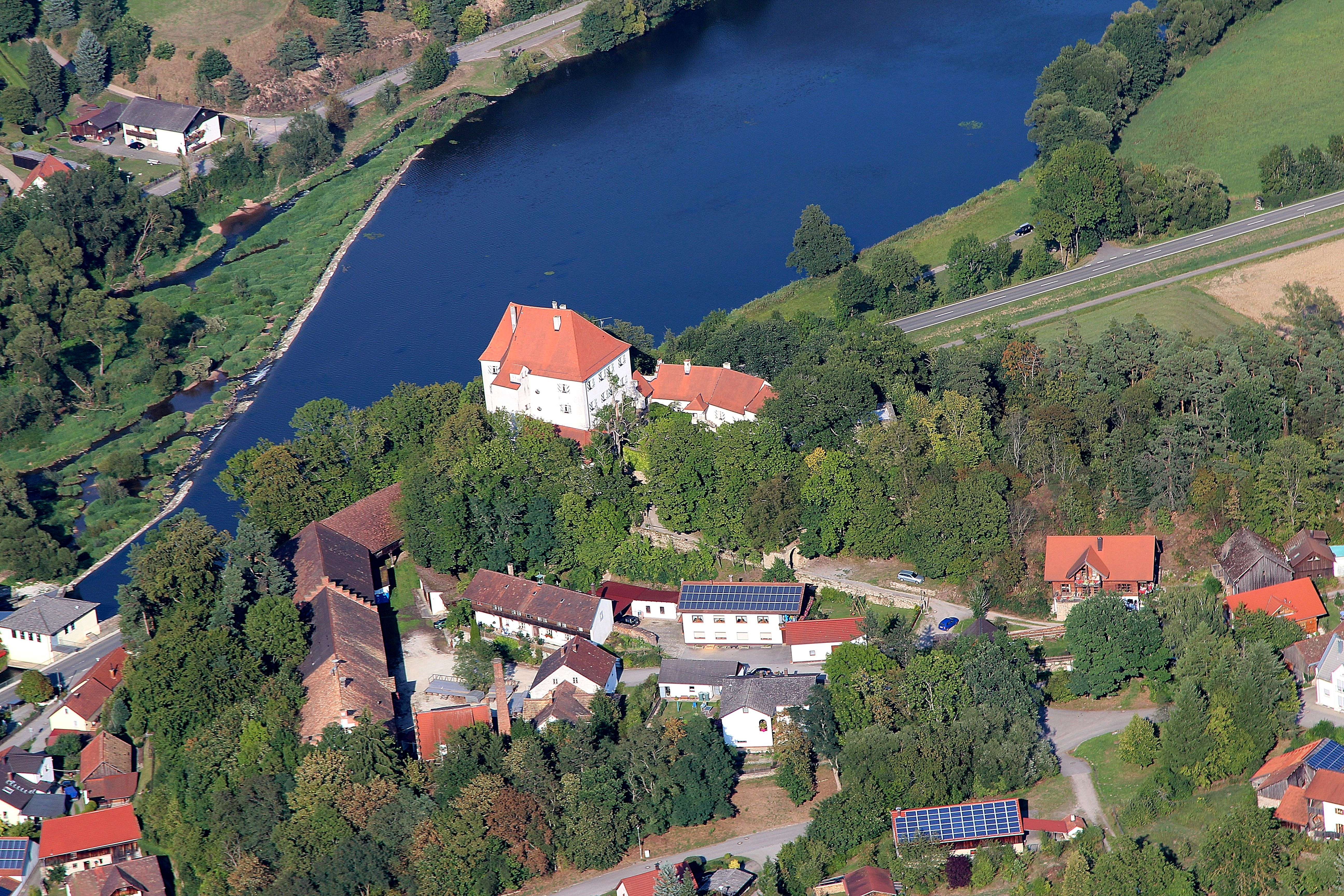 Stefling ist ein Ortsteil von Nittenau, Landkreis Schwandorf, Oberpfalz, Bayern